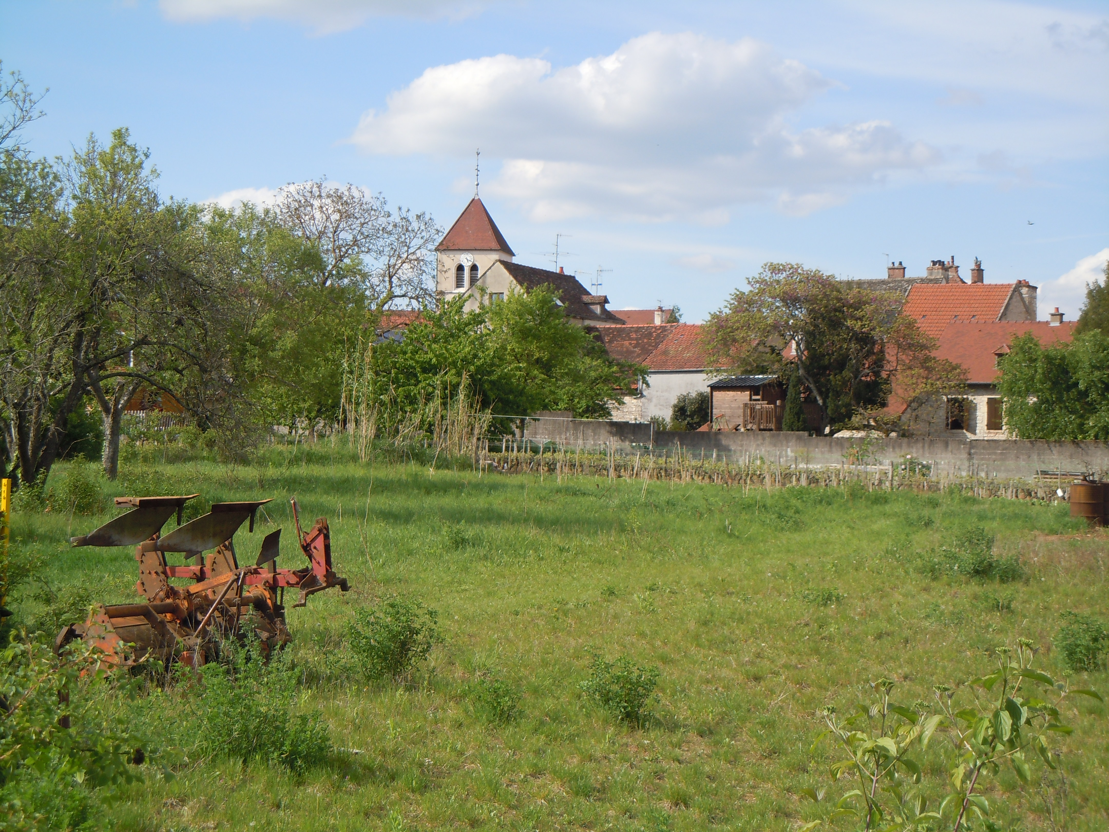 Terrains agricoles à proximité du Jardin Public du Clos du Roy à Chenôve